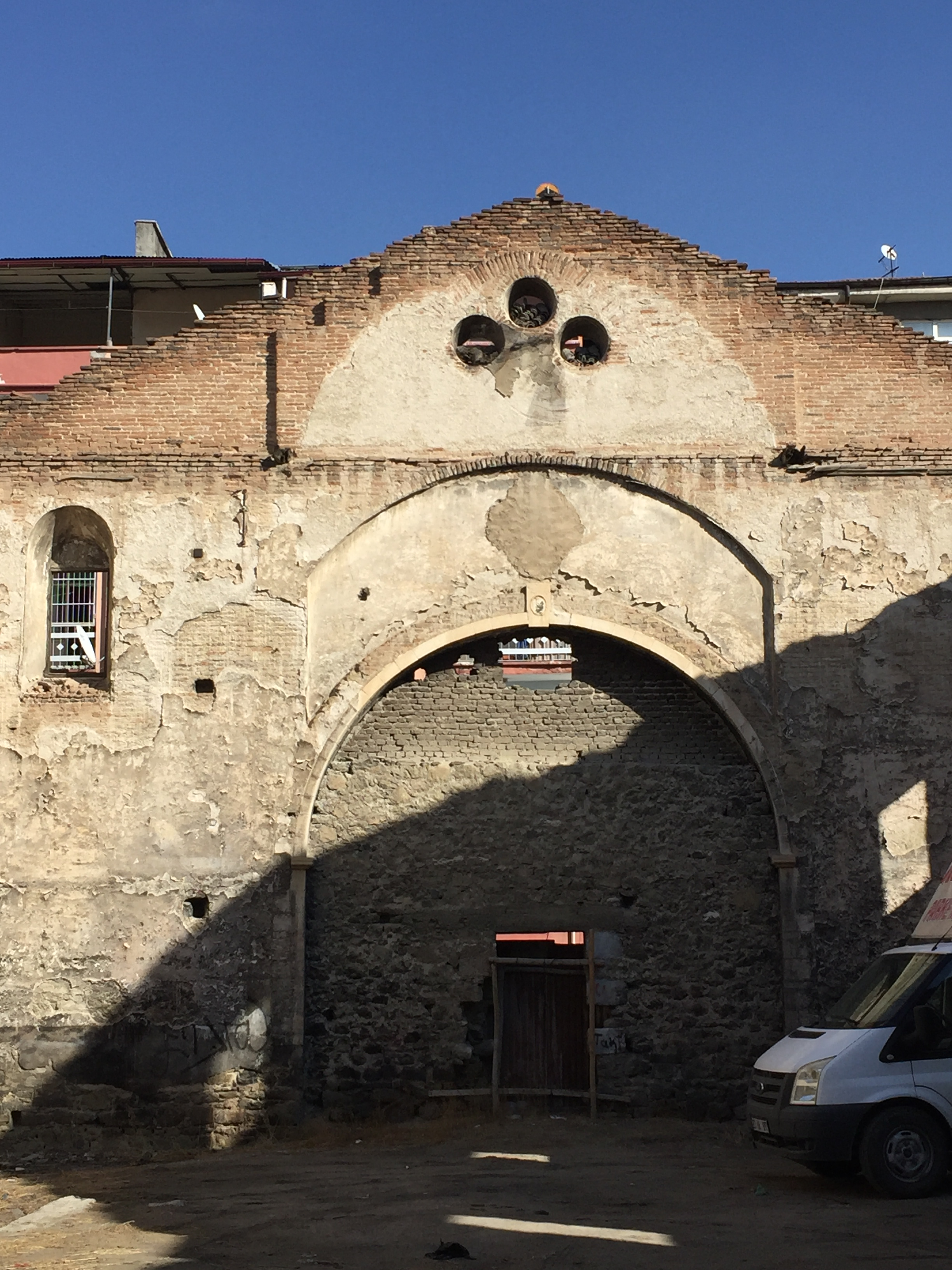 Elazığ Ermeni Protestan Kilisesi